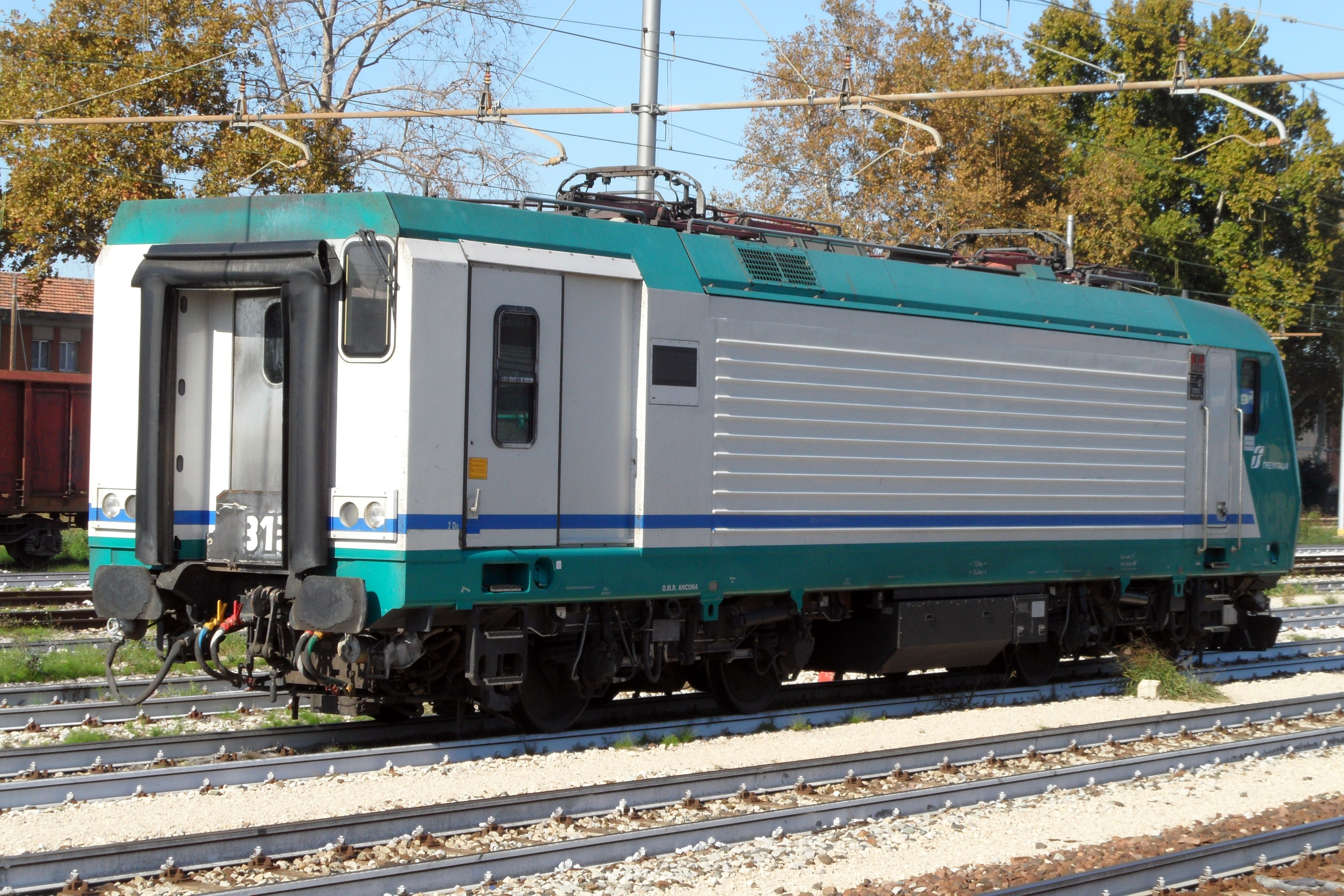 Abgestellte E464 mit Blick auf das Übergangsende. Dieses ist mit vollständigen Signallaternen ausgerüstet, im Gepäckraum gibt es einen abschließbaren Hilfsführerstand. Die Ladetüren waren für die Nutzung mit Zugbegleitpersonal vorgesehen und werden wegen der Personaleinsparungen kaum mehr genutzt. Wenn überhaupt, dann erfolgt der Zugang durch den Wagenübergang.